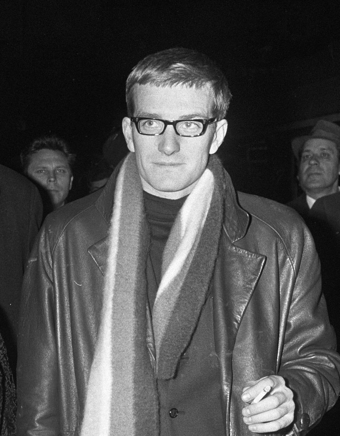 Aankomst Russisch Staatsorkest op CS Amsterdam. Maxim Sjostakowitsj